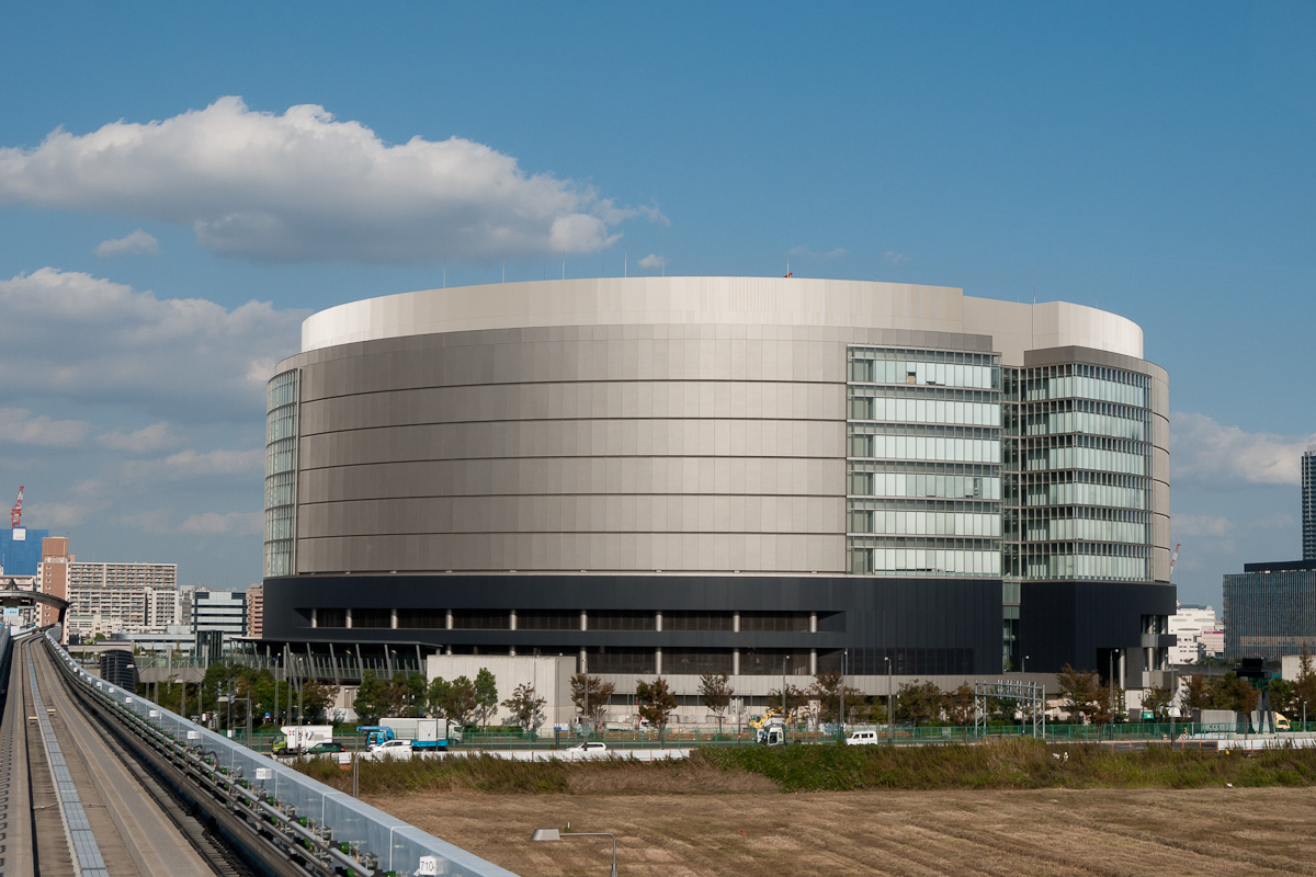 東京電力新豊洲変電所。